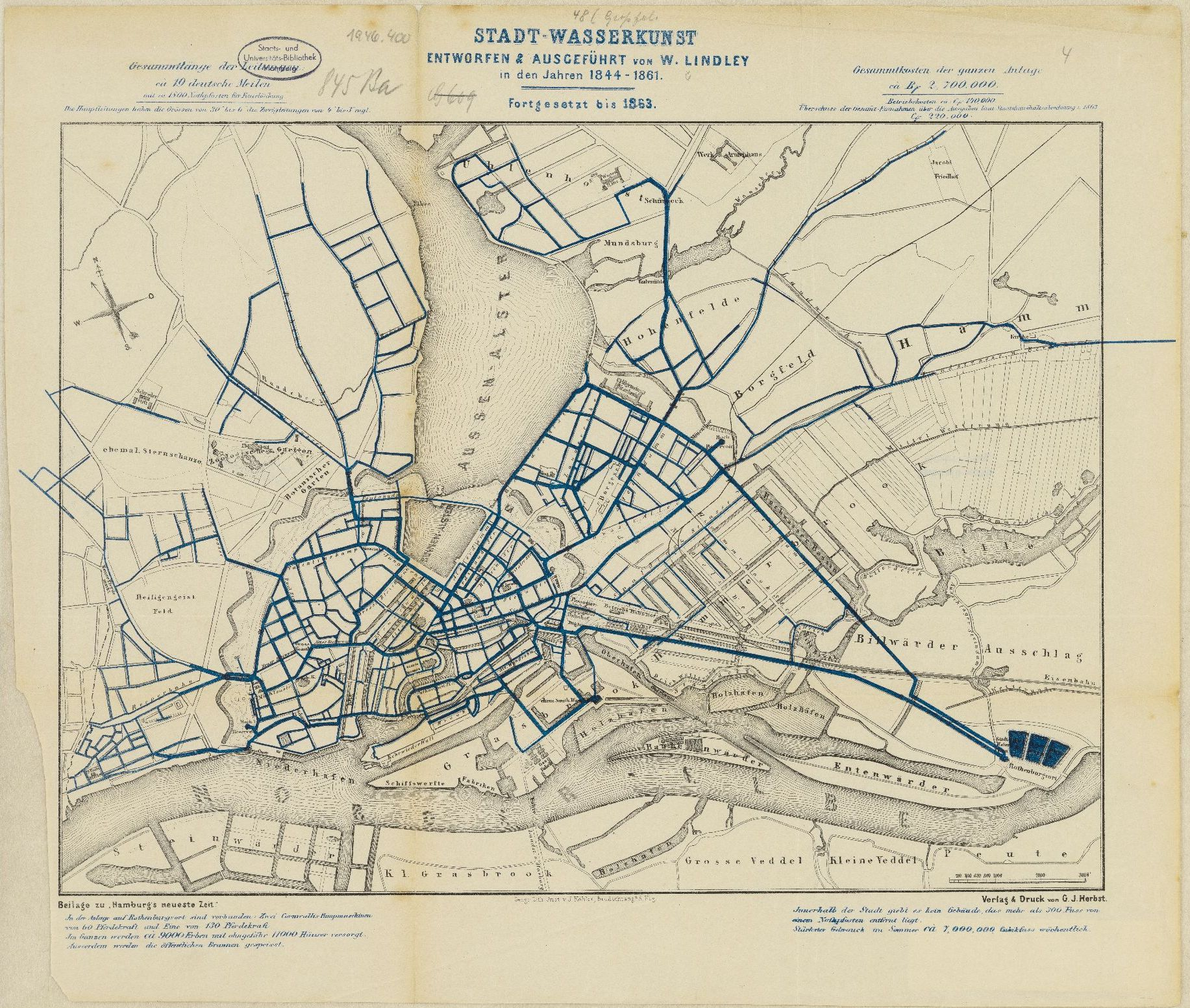 Stadt-Wasserkunst, Hamburg, Entworfen & Ausgeführt von W. Lindley in den Jahren 1844-1861 (Fortgesetzt bis 1863)